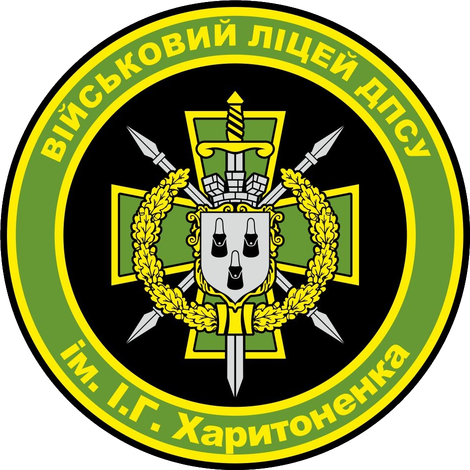 Офіційний герб Військового ліцею (з 2019)